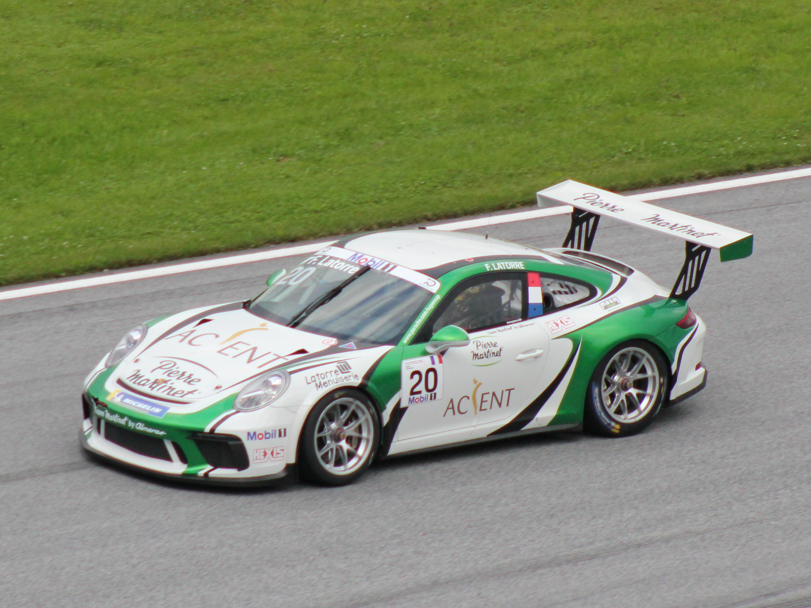 20 Florian Latorre beim Rennwochenende in Österreich 2018